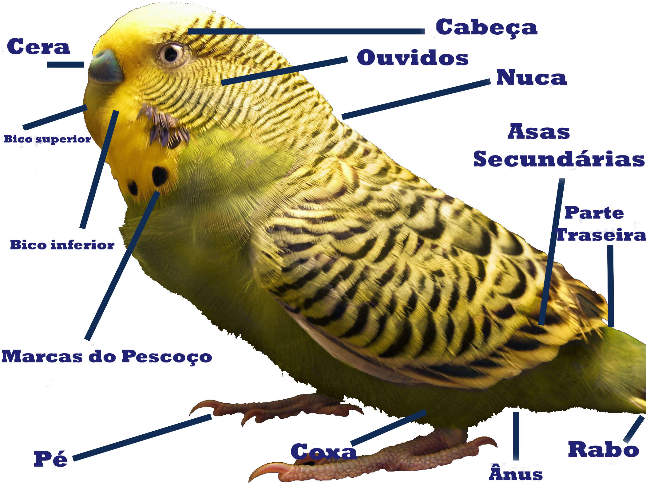 Partes do corpo de um periquito com detalhes.